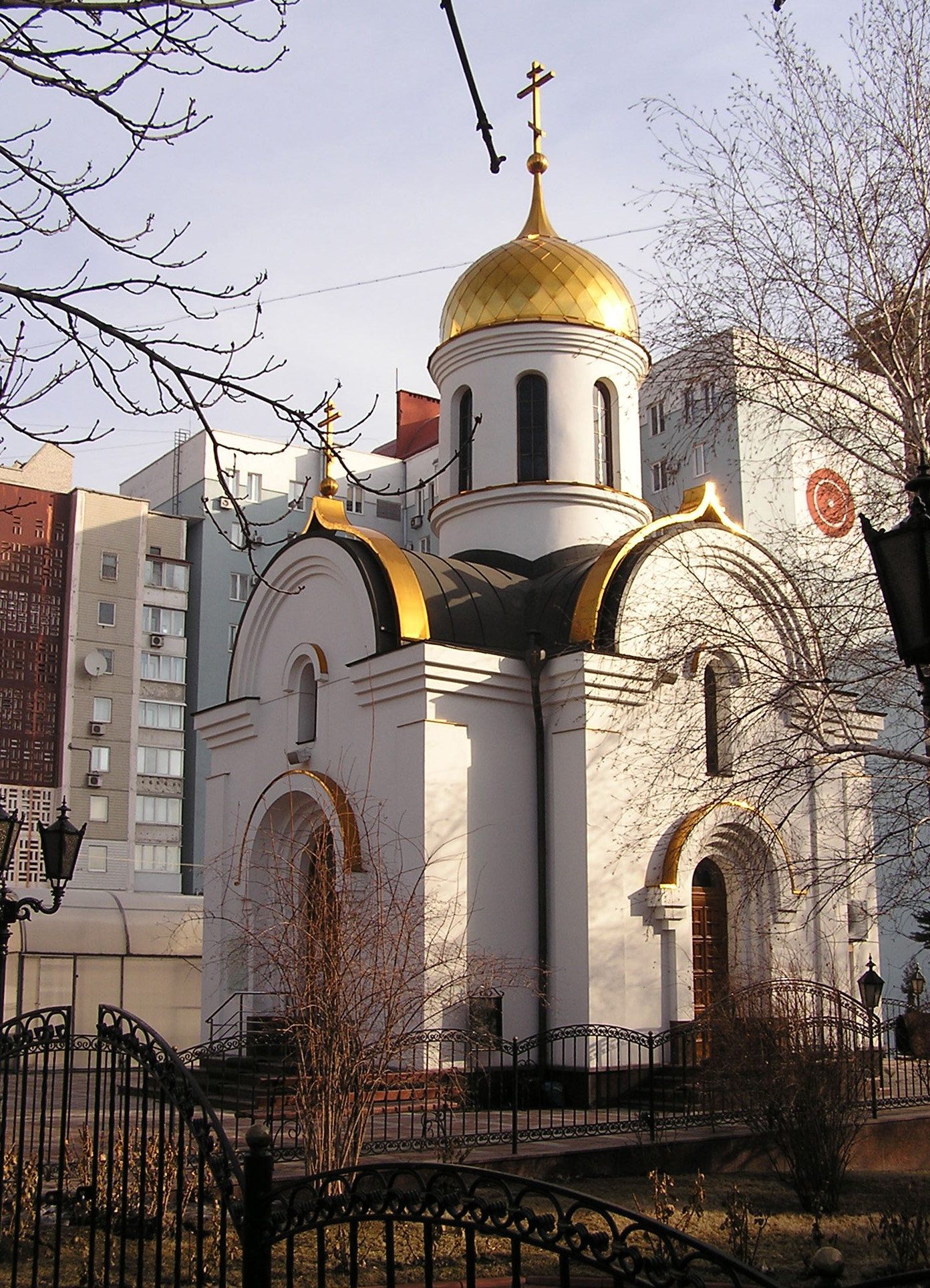 Донецк. Храм Святого Мученика Иоанна-Воина